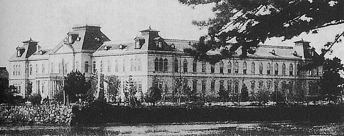 明治42年（1909年）竣工の島根県庁舎。松江騒擾事件の標的となり全焼。